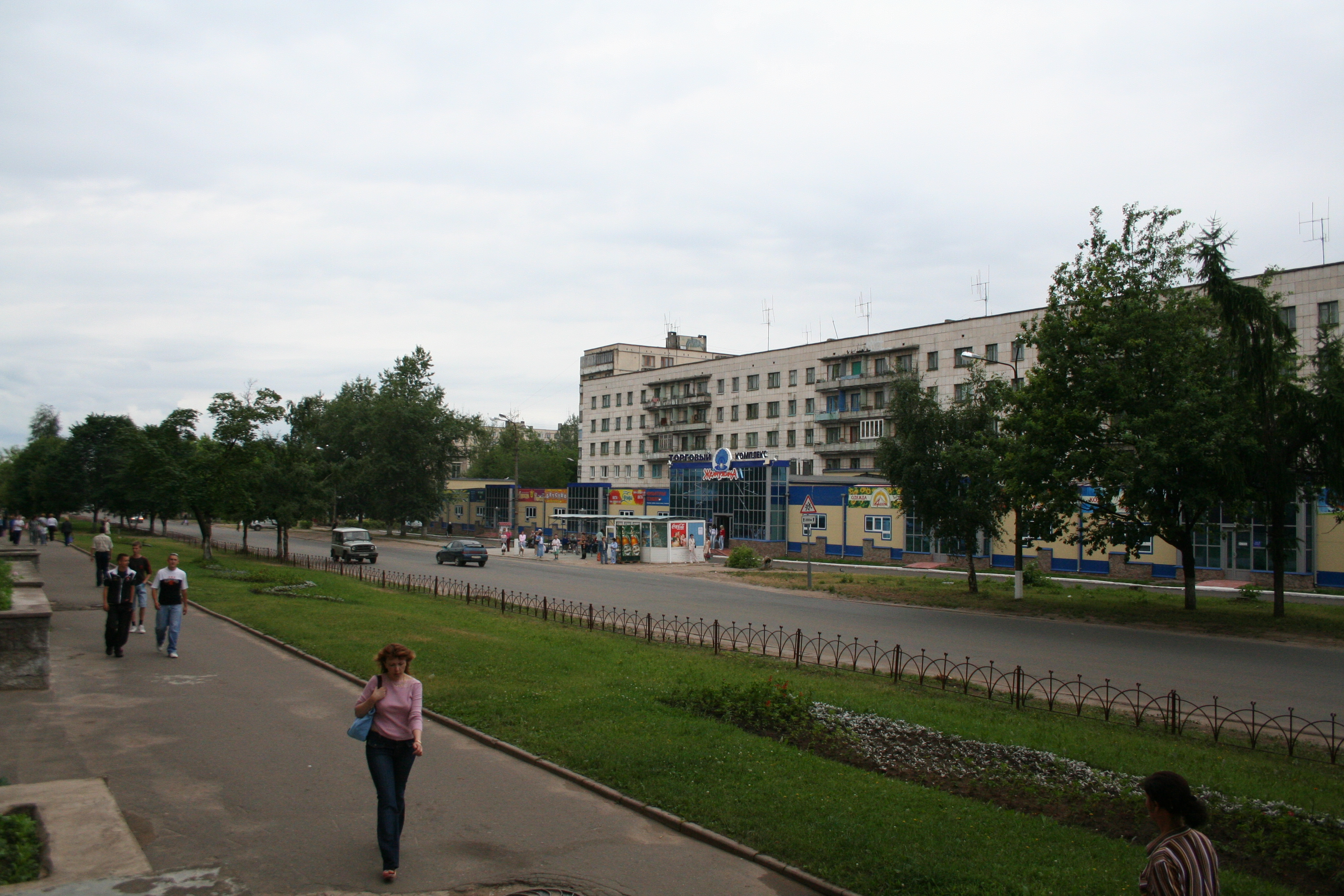 г. Тихвин (Ленинградская область, Россия), ул. Карла-Маркса (самая длинная улица города). Tikhvin (Leningrad Oblast, Russia), Karl Marx Street (the longest street of the town). Photo made on 2006-07-15 by Vladimir V. "Dr Bug" Medeyko.